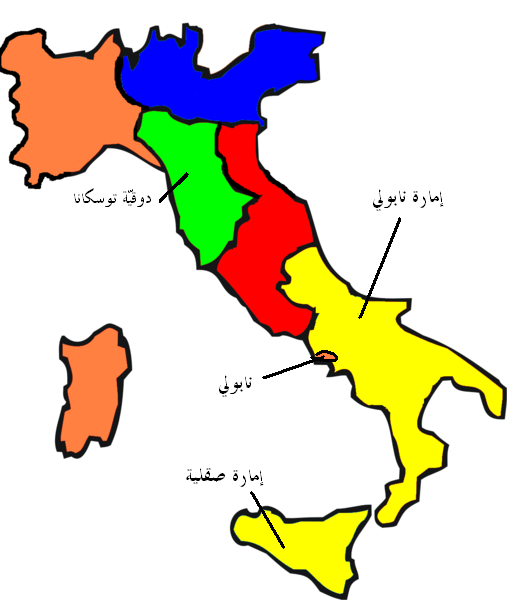 خريطة للمناطق الإيطالية التي أقام فيها الأمير فخر الدين المعني الثاني|فخر الدين المعني الثاني.